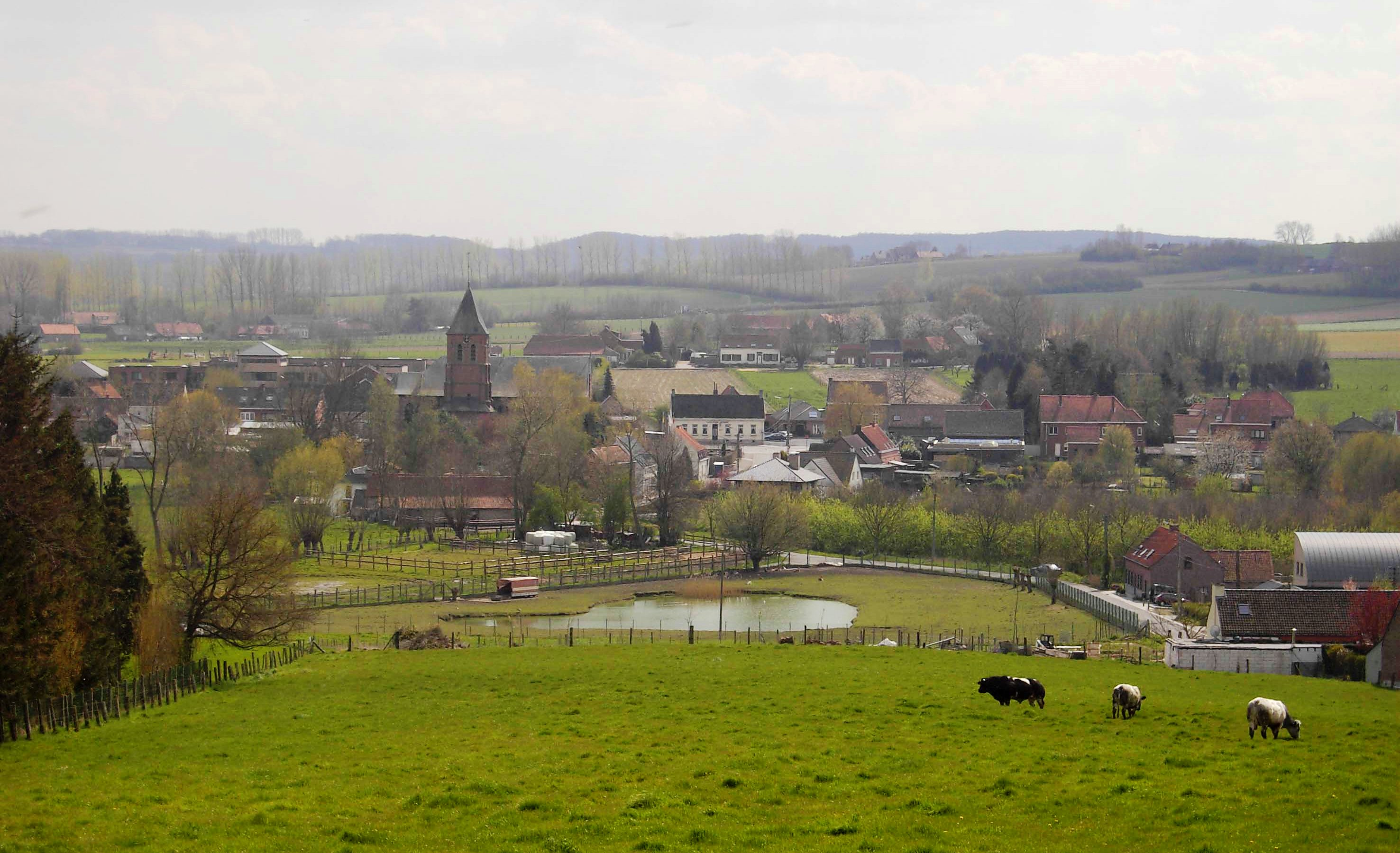 Maarke - Maarke-Kerkem - Maarkedal - Belgium - zicht op dorp.